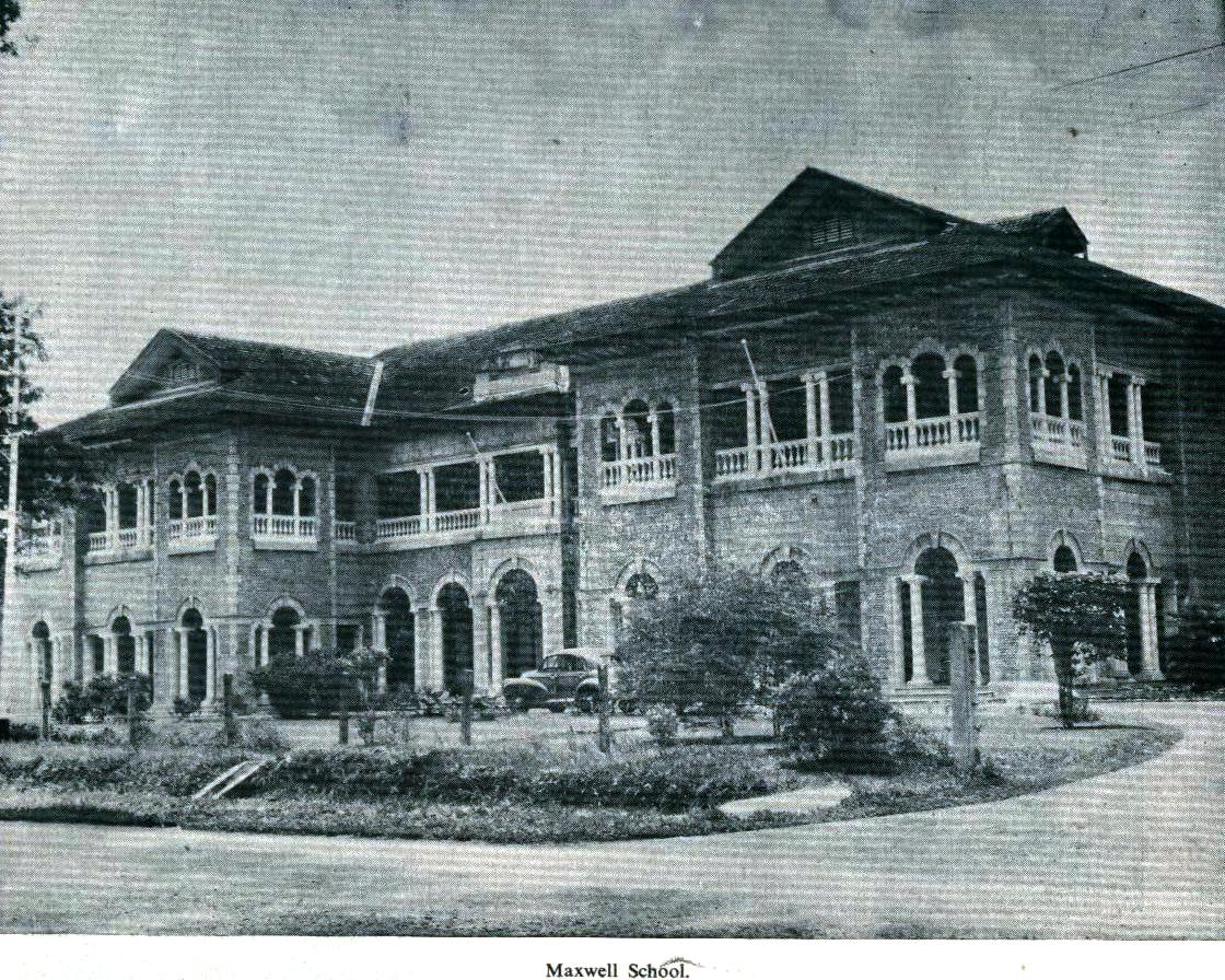 Maxwell School, 1954